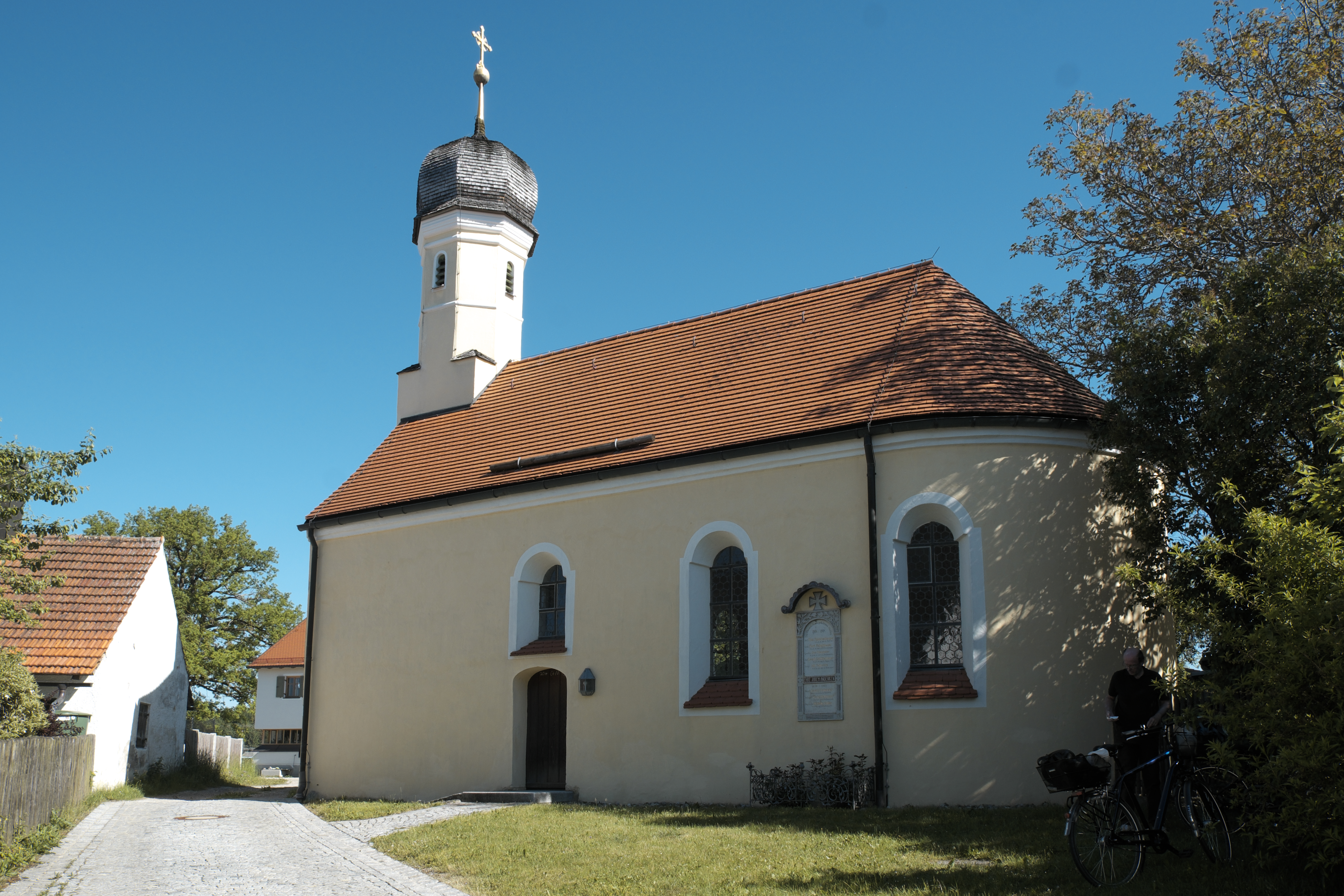 Katholische Kapelle St. Nikolaus in Frohnloh (Krailling) im Landkreis Starnberg (Bayern/Deutschland)